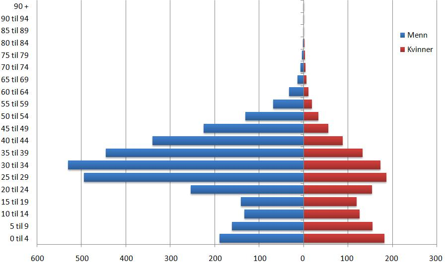 De Forente Arabiske Emiraters befolkningspyramide fra 2008 (per tusen)